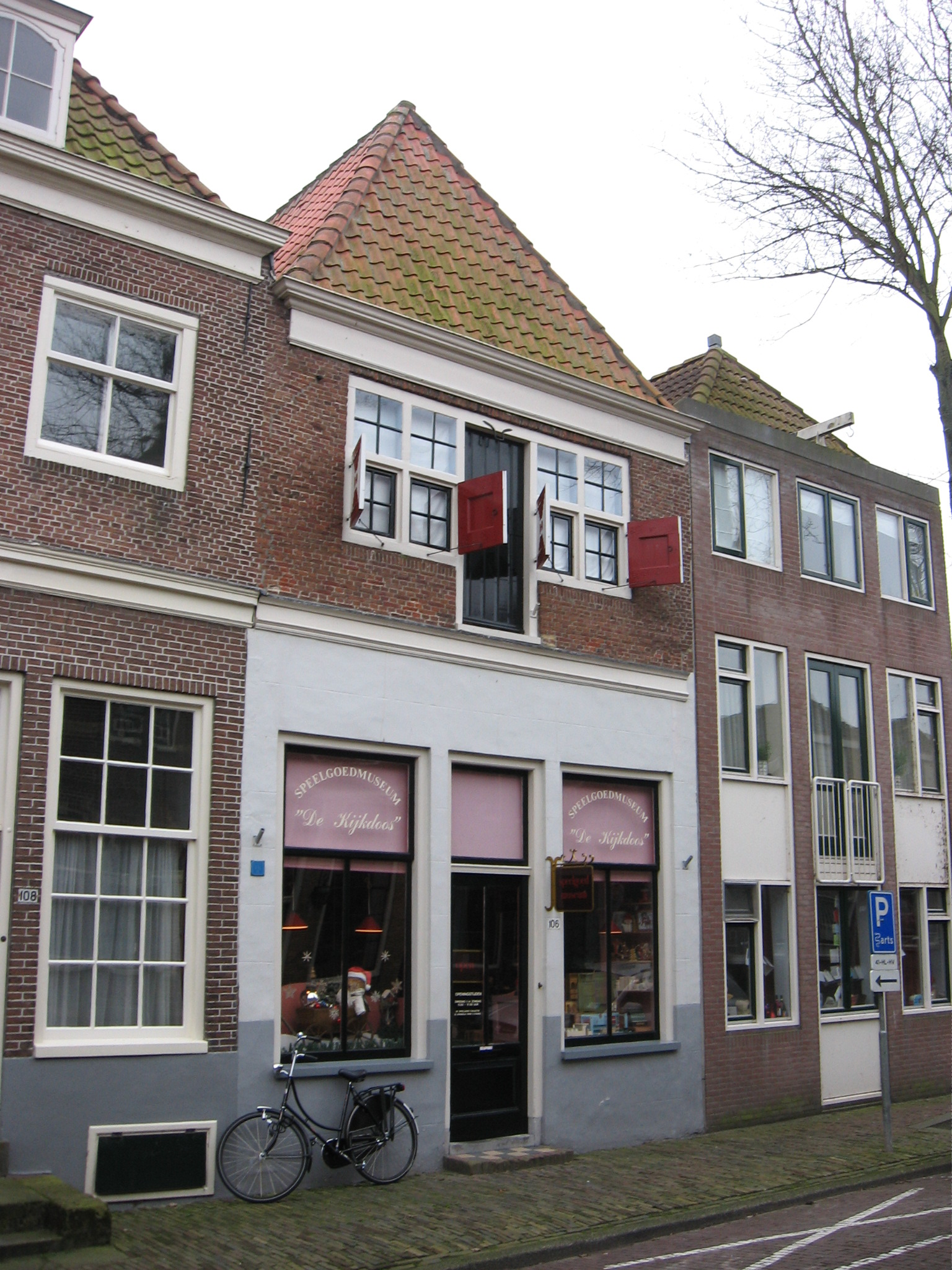 Hoorn, dec 2006